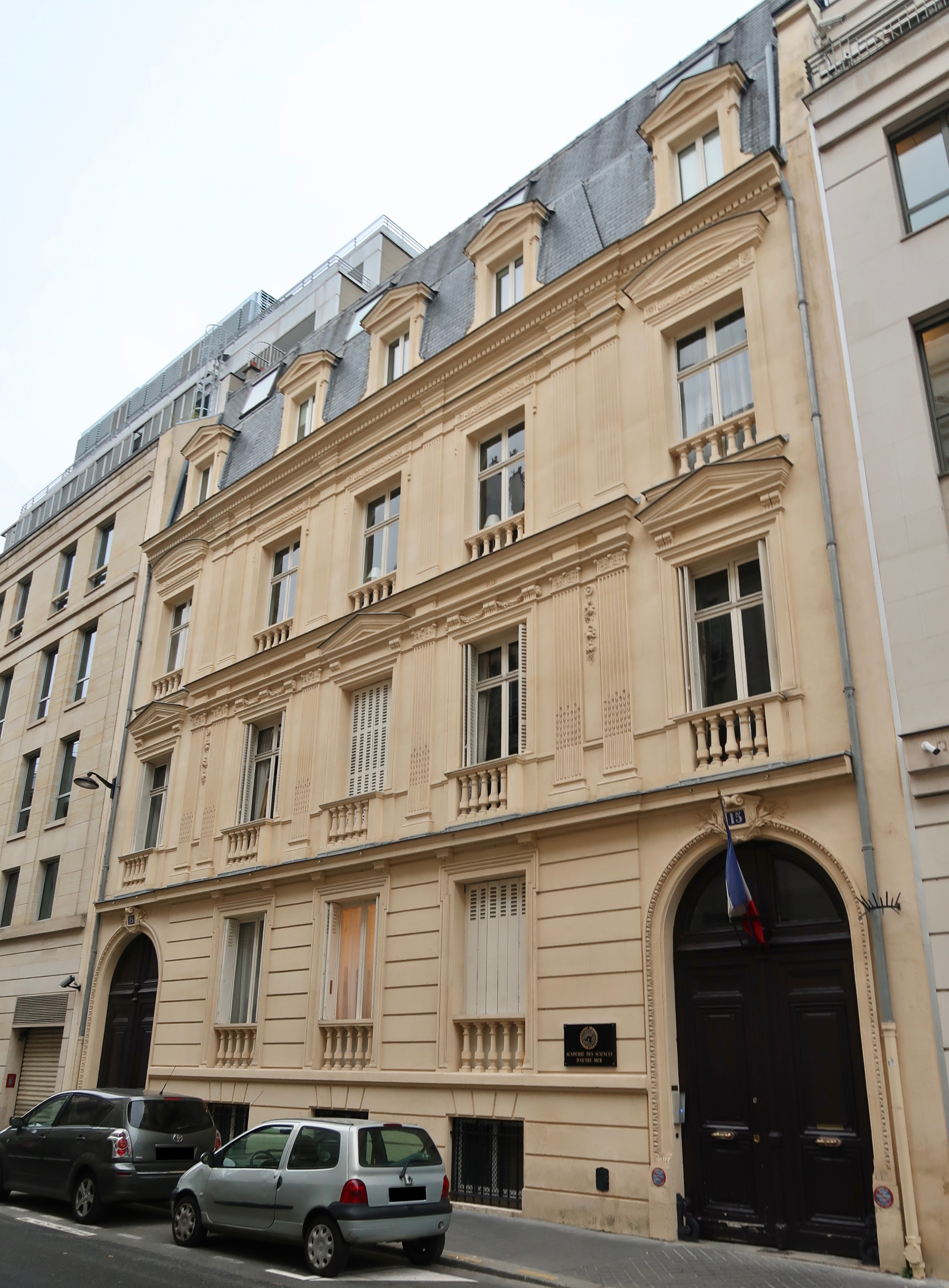 Académie des sciences d'outre-mer, 15 rue La Pérouse (Paris, 16e).